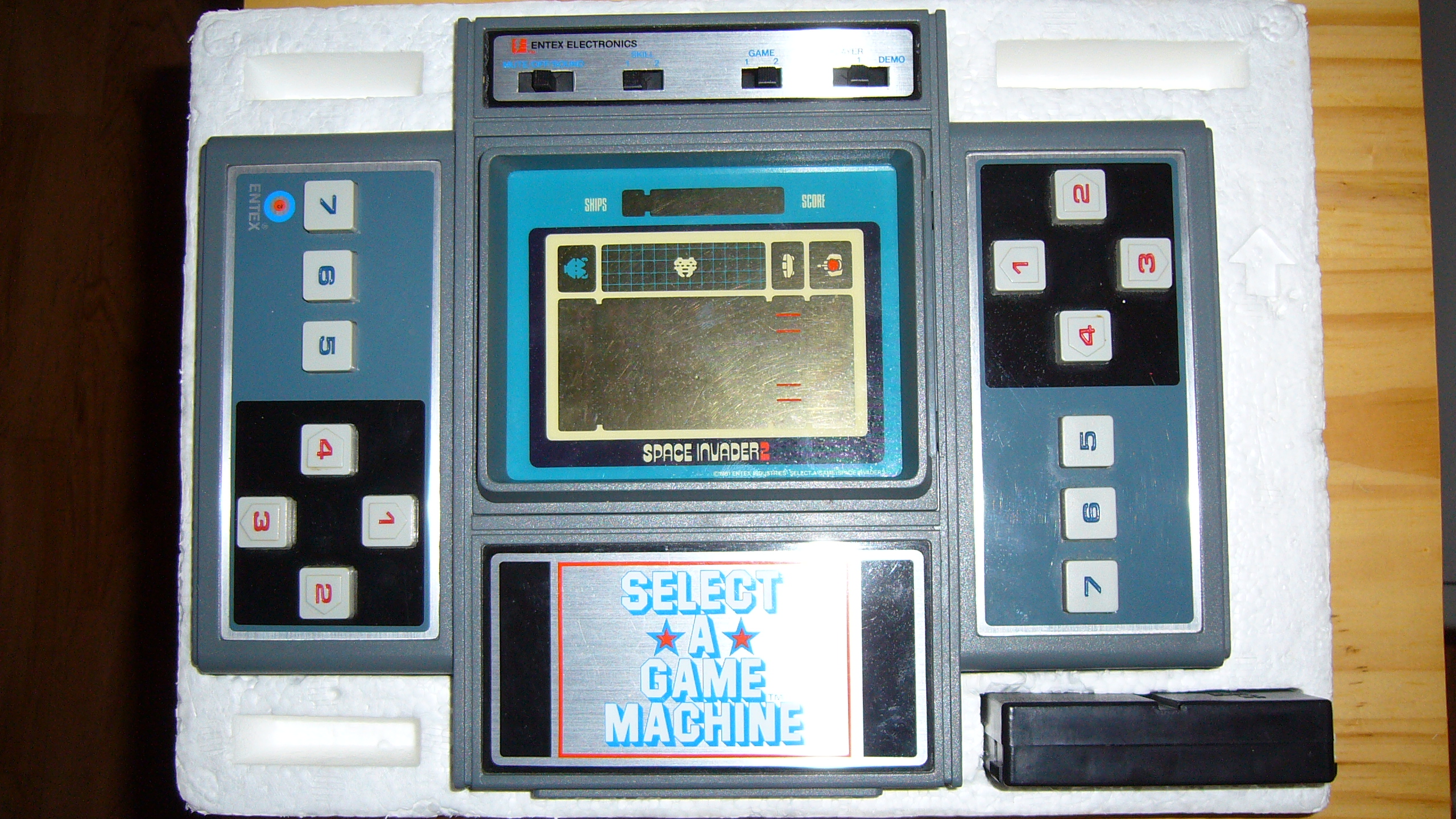 Consola portatil Entex Select a Game